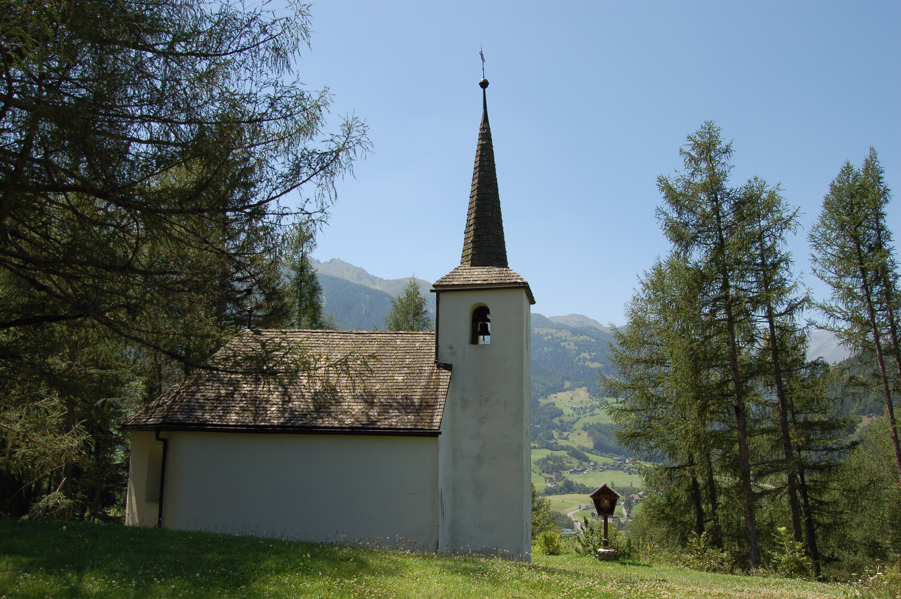 Klaunzkapelle in der Fraktion Klaunz (Gemeinde Matrei in Osttirol)